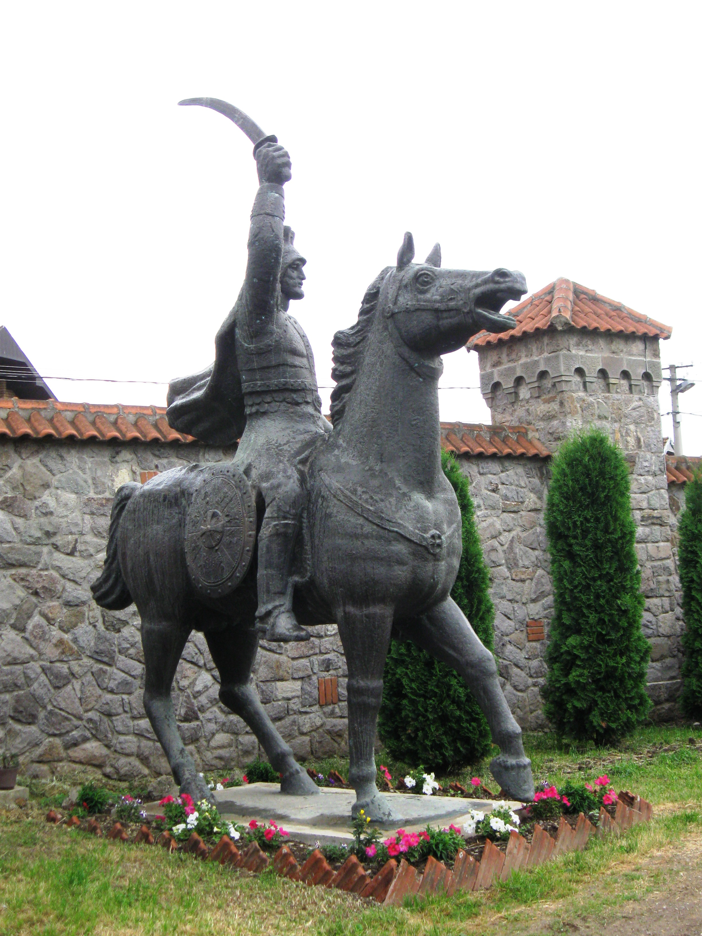 Snimak Radosava Stojanovica